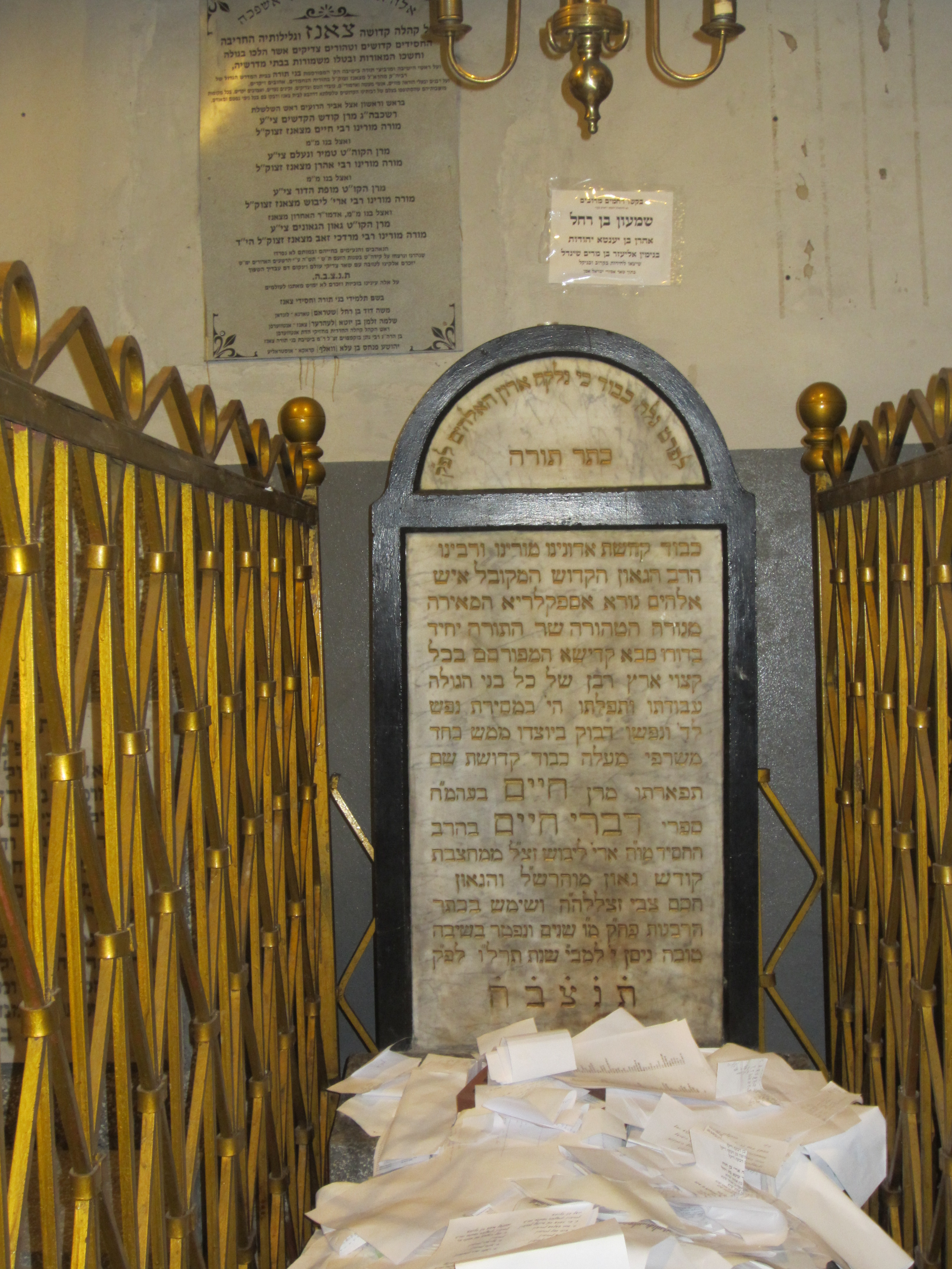 אוהל הדברי חיים מצאנז. קברו (2).jpg